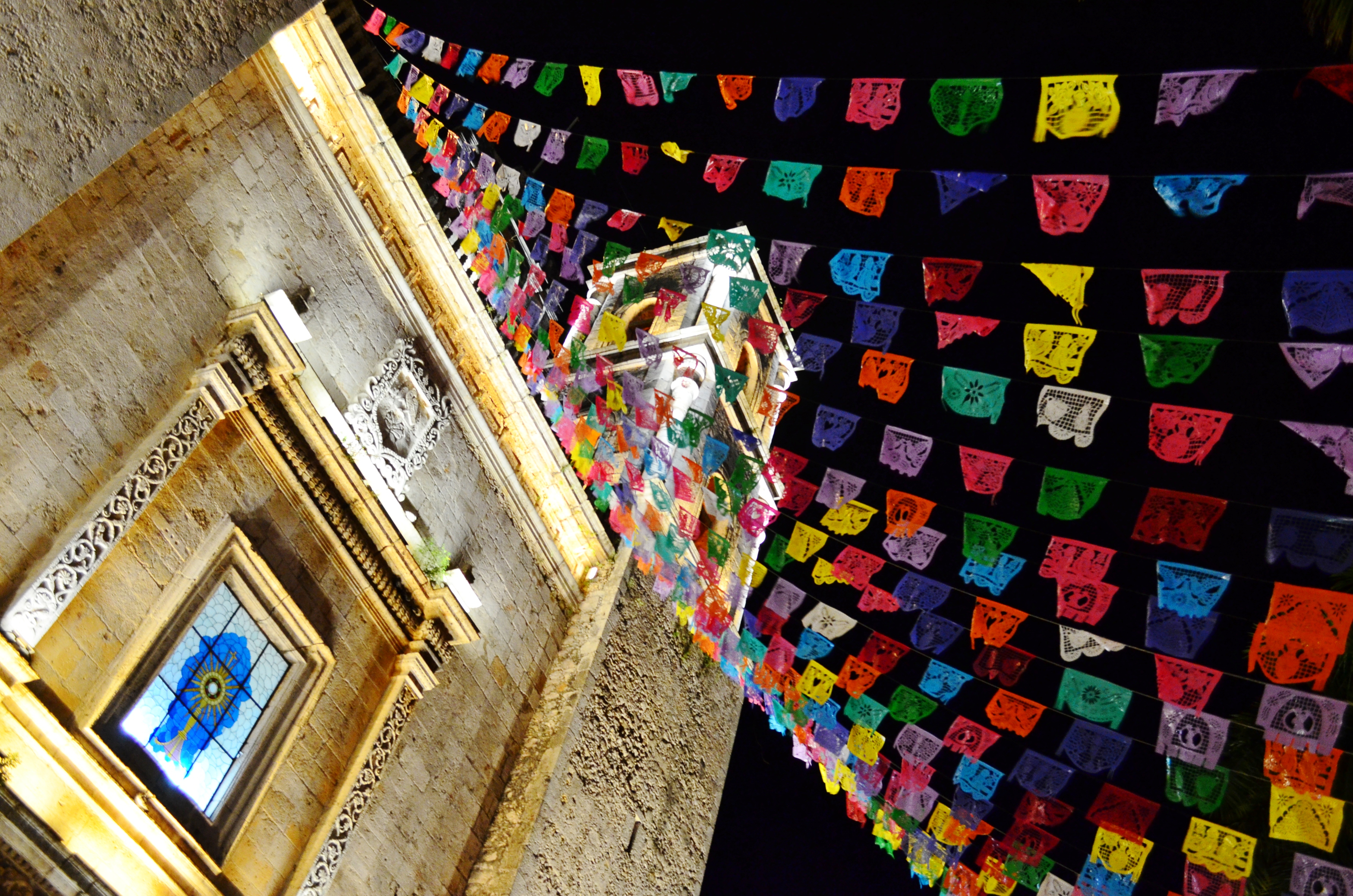 La iglesia más famosa e importante se ubica frente de la plaza y parque principal Francisco Cantòn, empezada a construir en 1543, luego de la fundación de Valladolid. Al llegar los conquistadores la víspera de la asunción de Nuestra Señora, fue cambiada la veneración principal de la iglesia, aunque siendo siempre el abogado de ella, San Gervasio. La parroquia originalmente construida el siglo XVI, fue escenario de un sangriento crimen en el siglo XVIII, por lo cual, a manera de desagravio, el templo fue remodelado, reorientando su fachada hacia el norte. Se conservó el pórtico de la fachada principal que miraba, según la costumbre, hacia el poniente, con las esculturas de San Pedro y San Pablo.